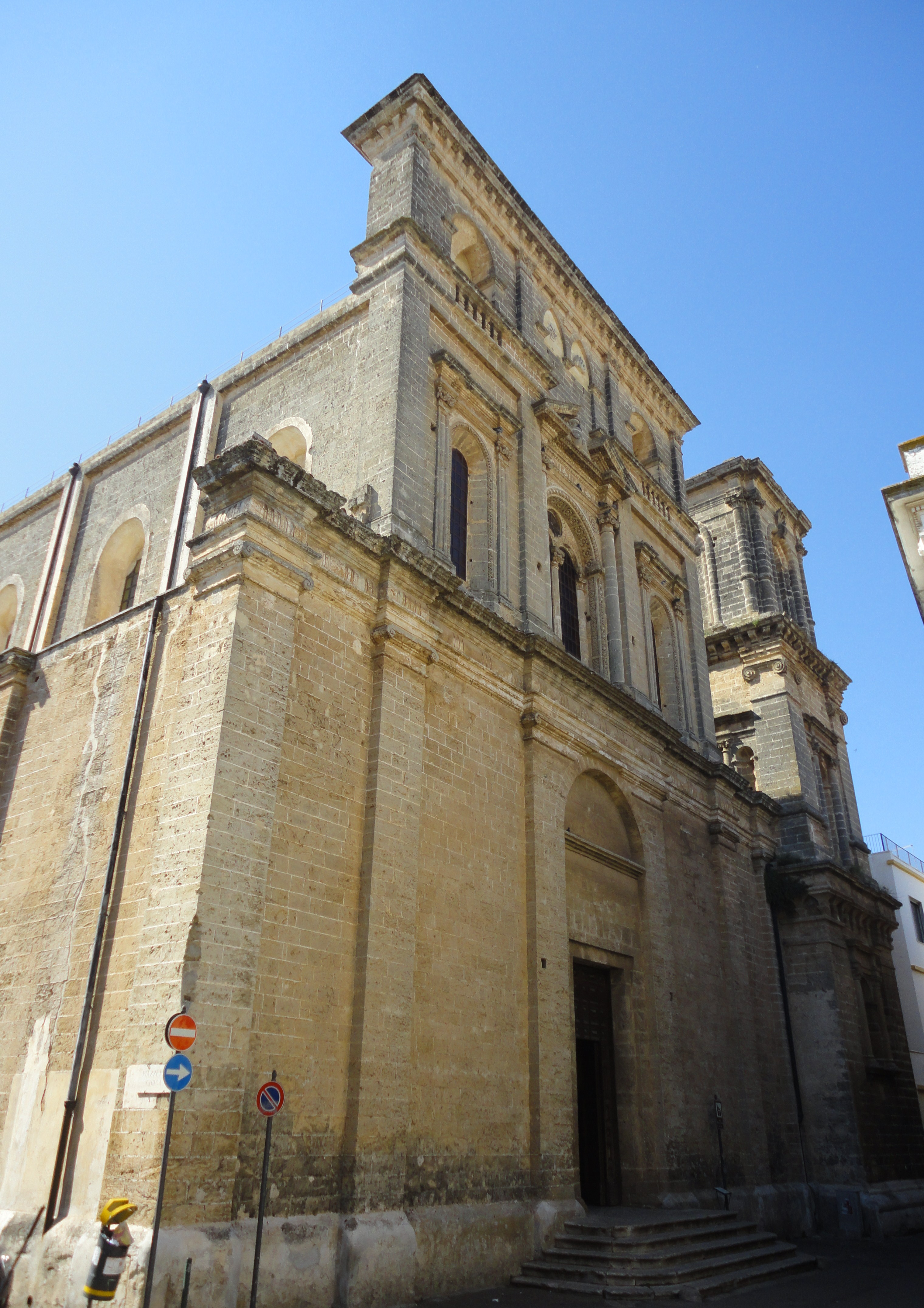 Collegiata dell'Assunta Galatone, Lecce